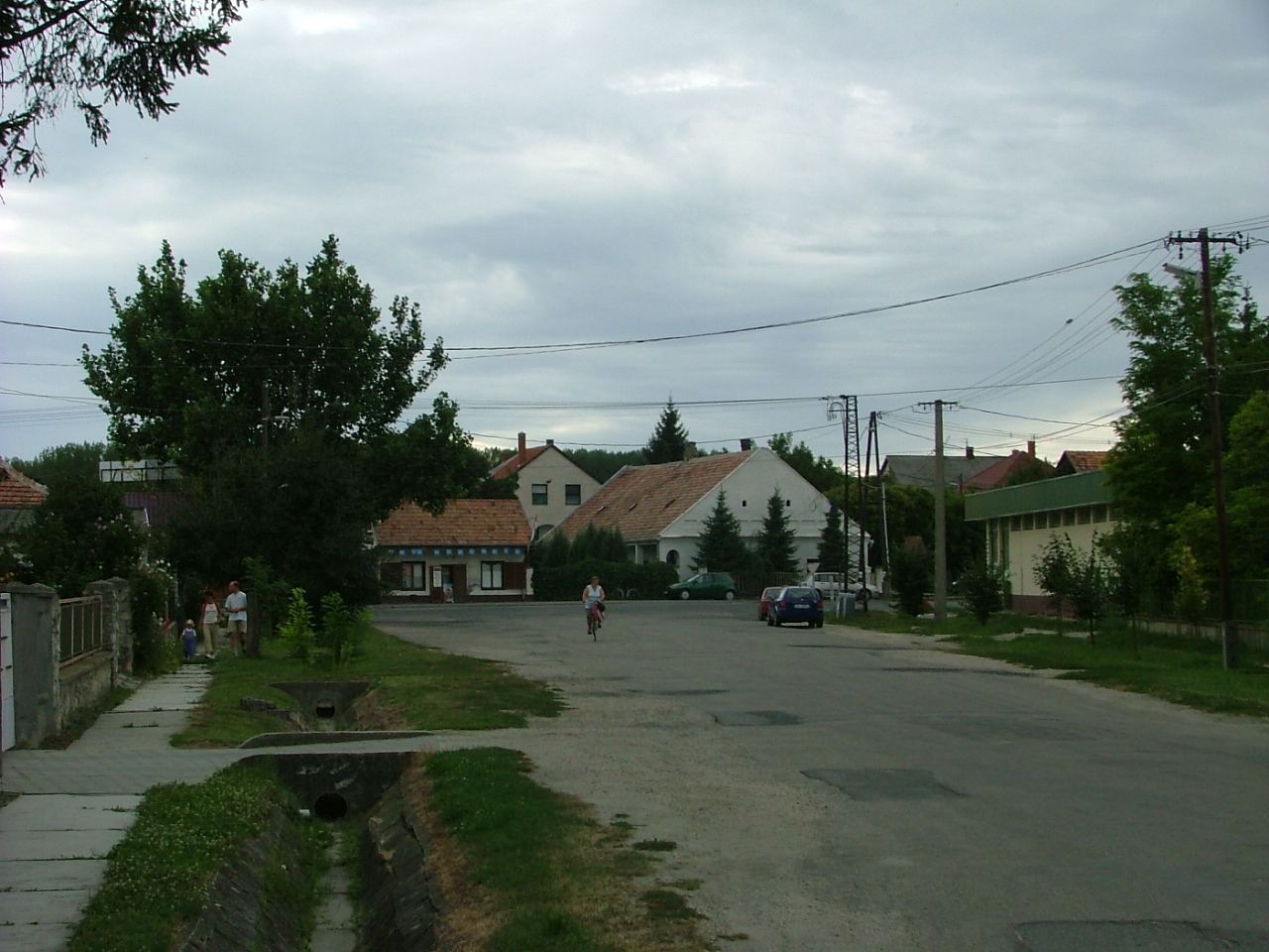 Győrzámolyi utca